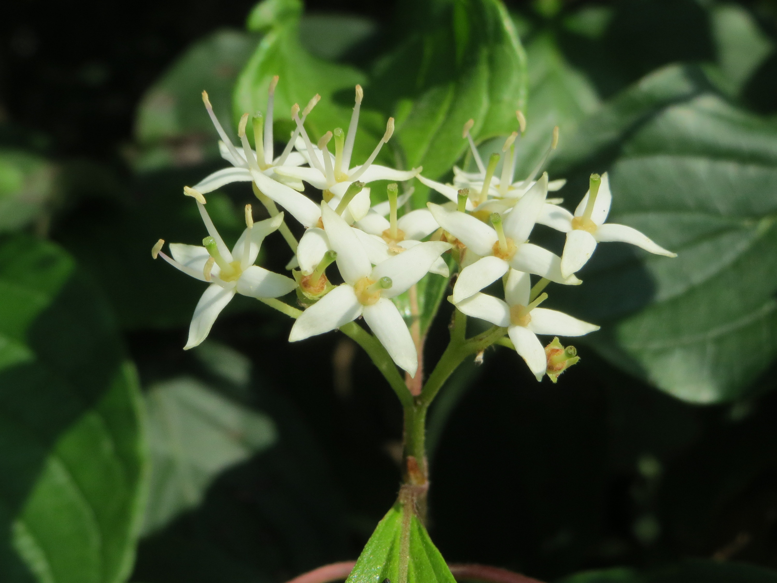 Roter Hartriegel (Cornus sanguinea) bei Hockenheim